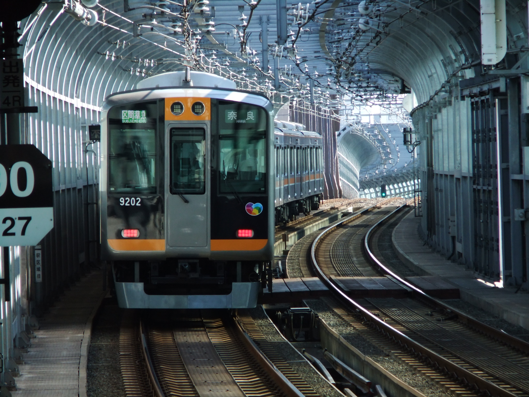 西九条ー九条間の防音シールド区間を走る9000系